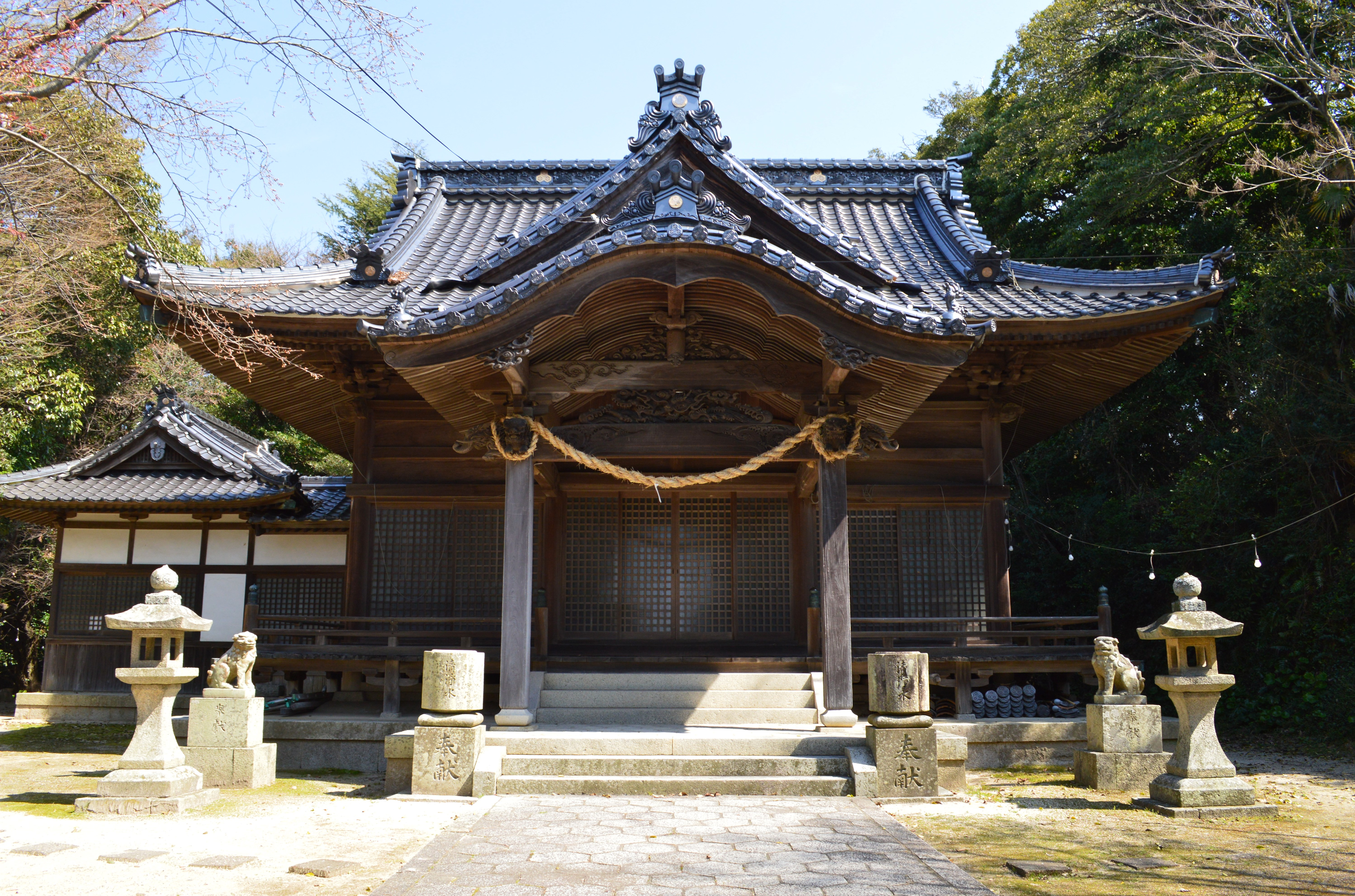 白鳥神社 (平生町) 拝殿